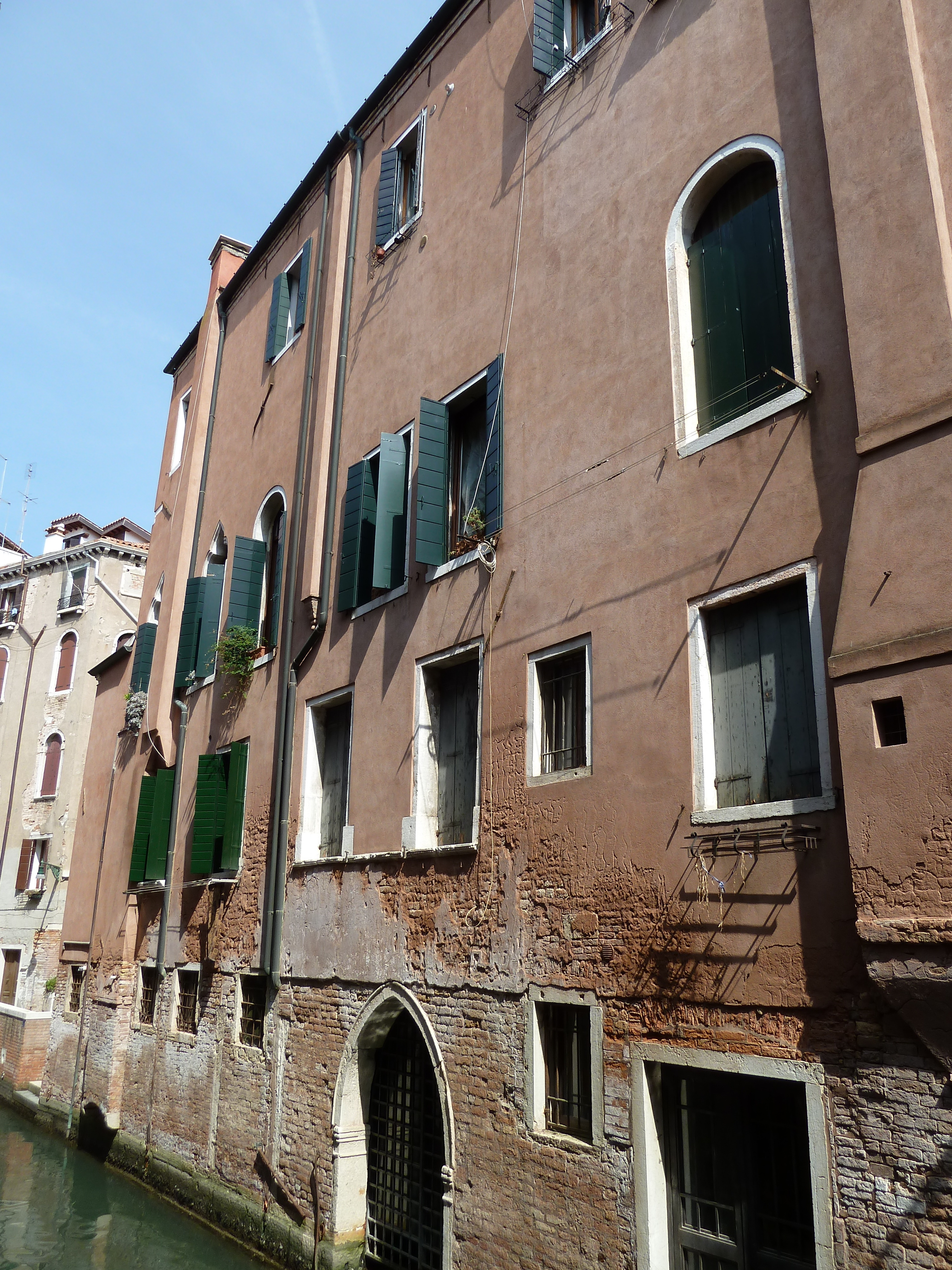 Pal querini dubois riello de le erbe